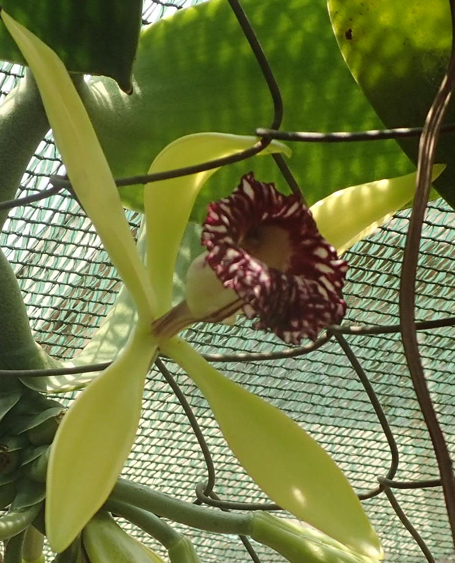 Pétales et sépales verdâtre